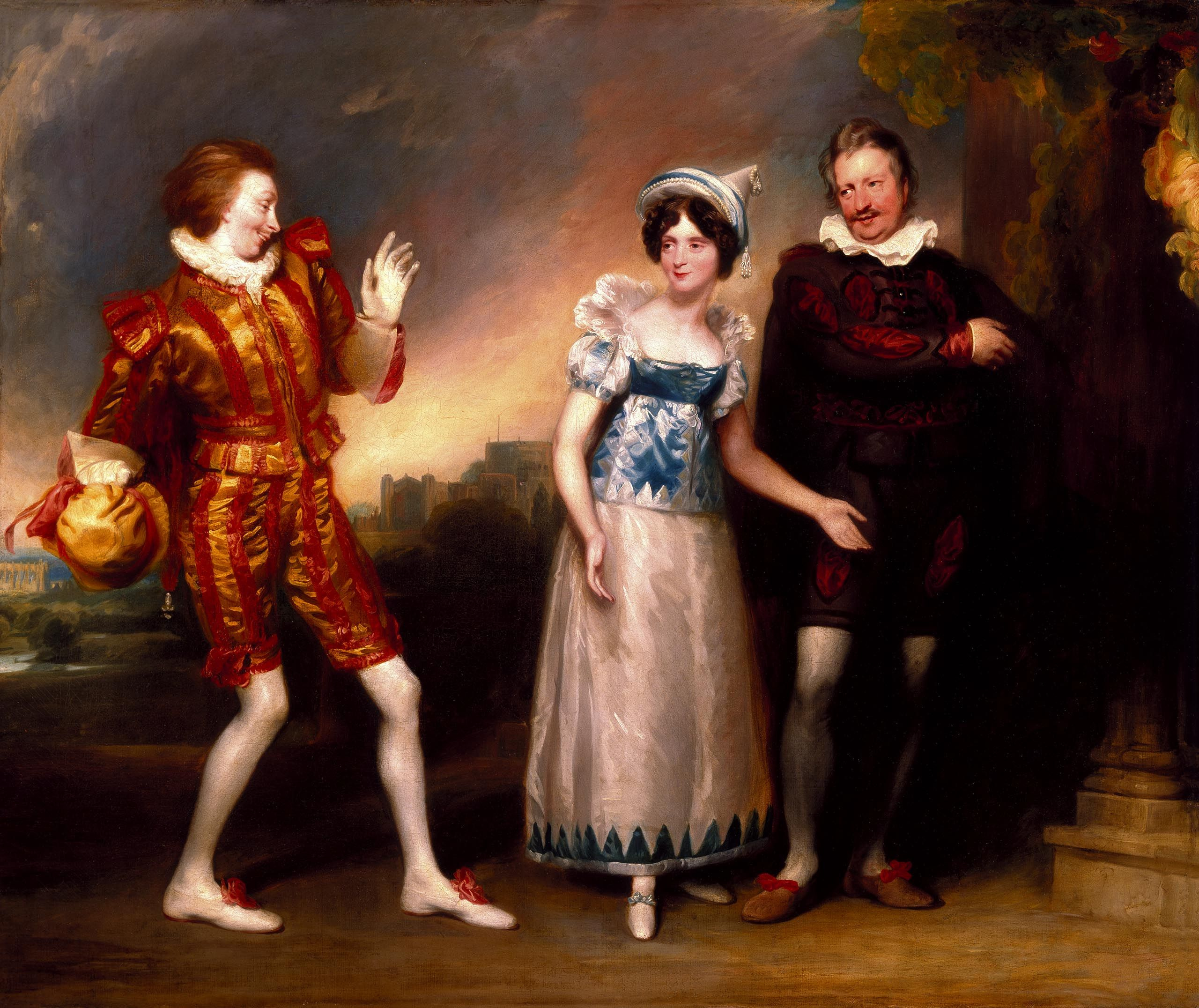 Master Page, Anne Page, and Slender.